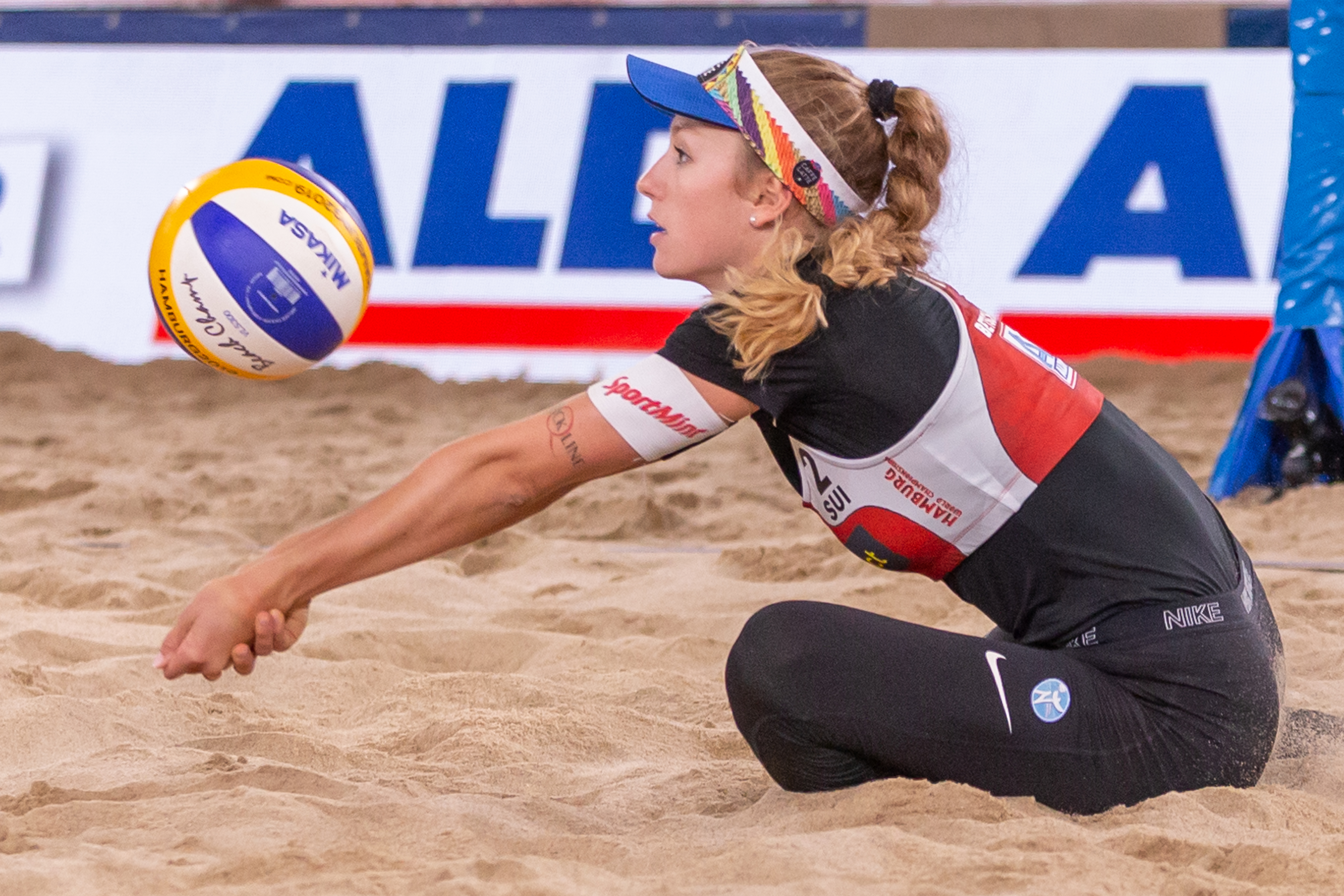 BeachVolleyball Weltmeisterschaft Hamburg 2019; Nina Betschart (SUI, Schweiz) bei der Ballannahme